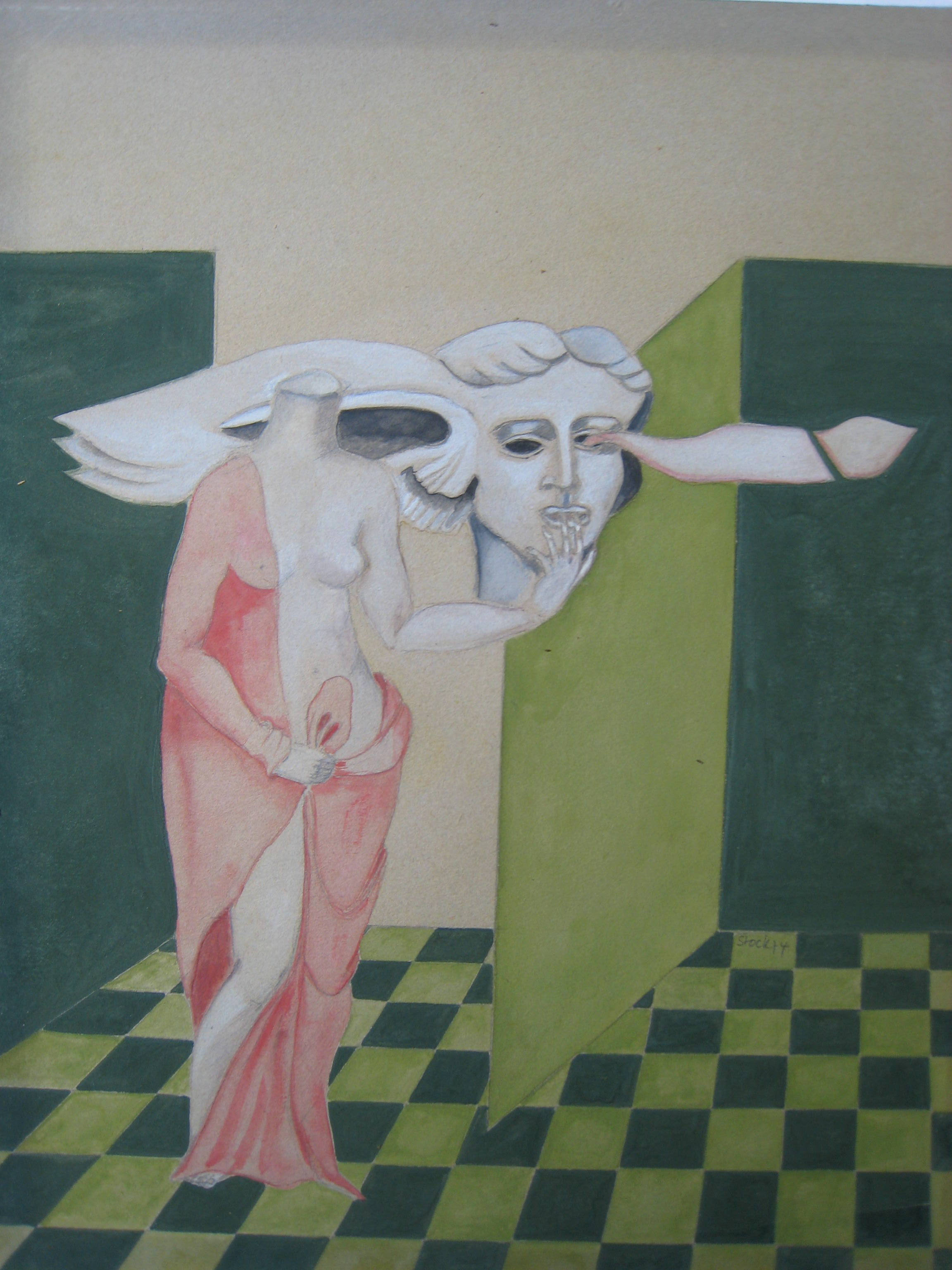 Kopflos greift sie Hypnos in die Lippen von Ursula Stock, farbige Gouache, Höhe x Breite: 24 x 19 cm, 1974.